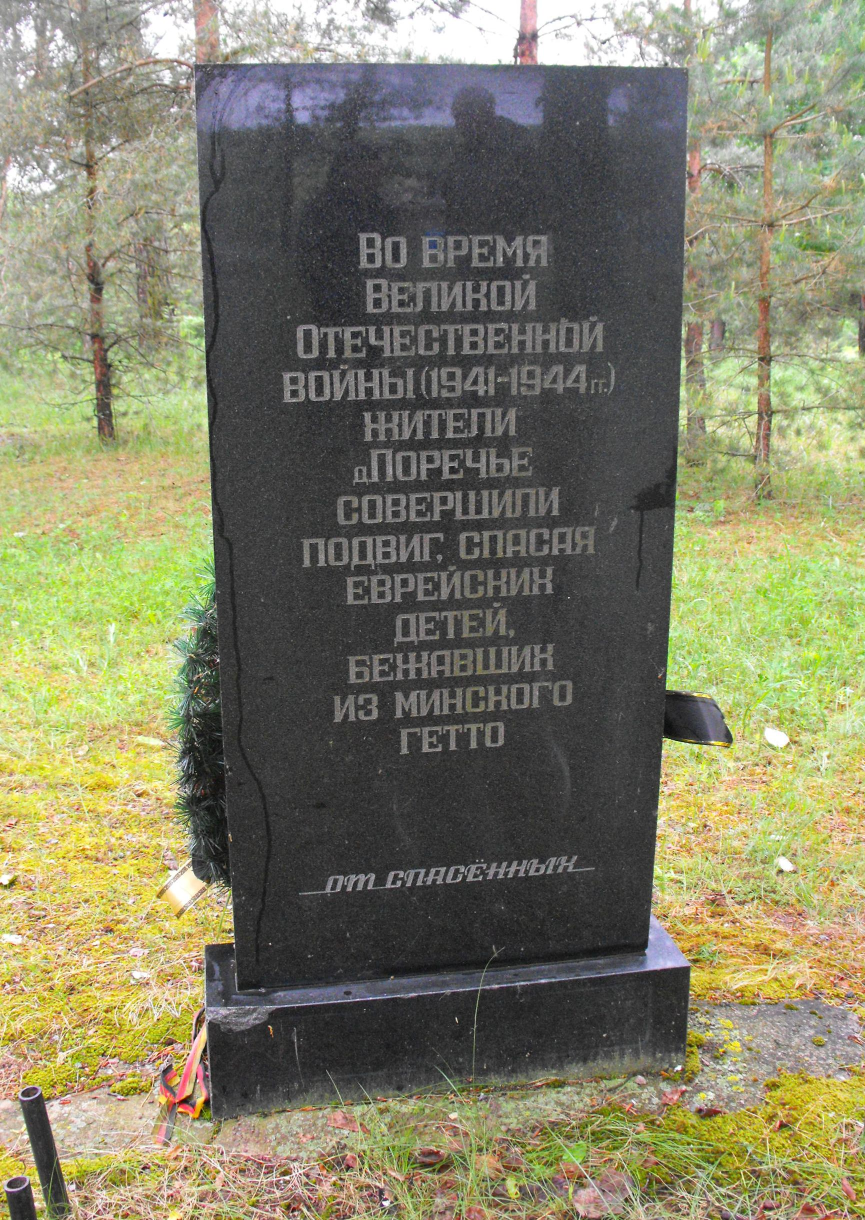 Мемориал в деревне Поречье Селецкого сельсовета Пуховичского района Минской области в память о партизанах и жителях деревни, спасавших еврейских детей из Минского гетто в годы Великой отечественной войны.